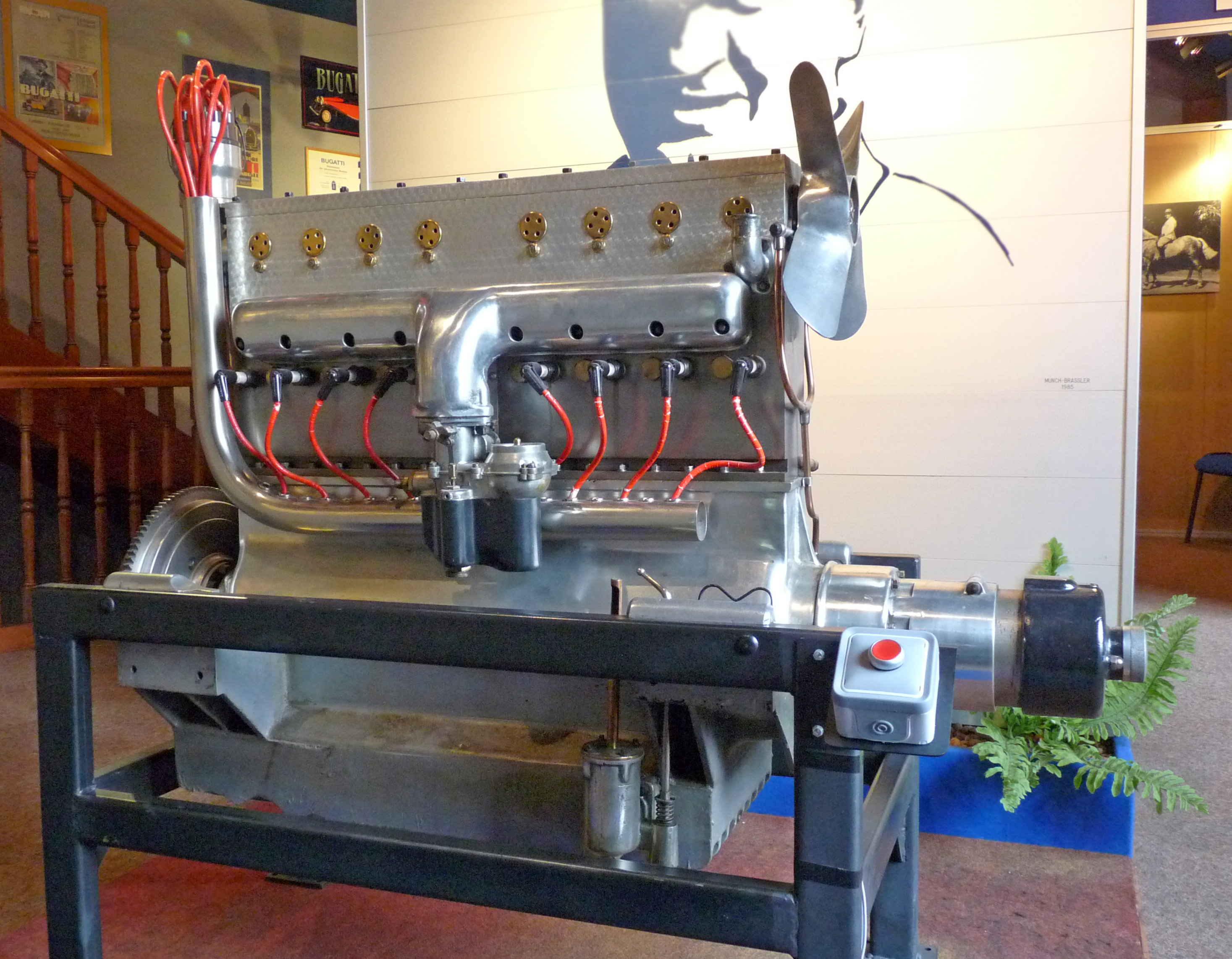 Moteur Bugatti Type 49 (1930). Huit cylindres en ligne, 3,3 l de cylindrée. Arbre à cames en tête. 3 soupapes par cylindre (24 soupapes). Double allumage. Musée de la Chartreuse et Fondation Bugatti (Molsheim)